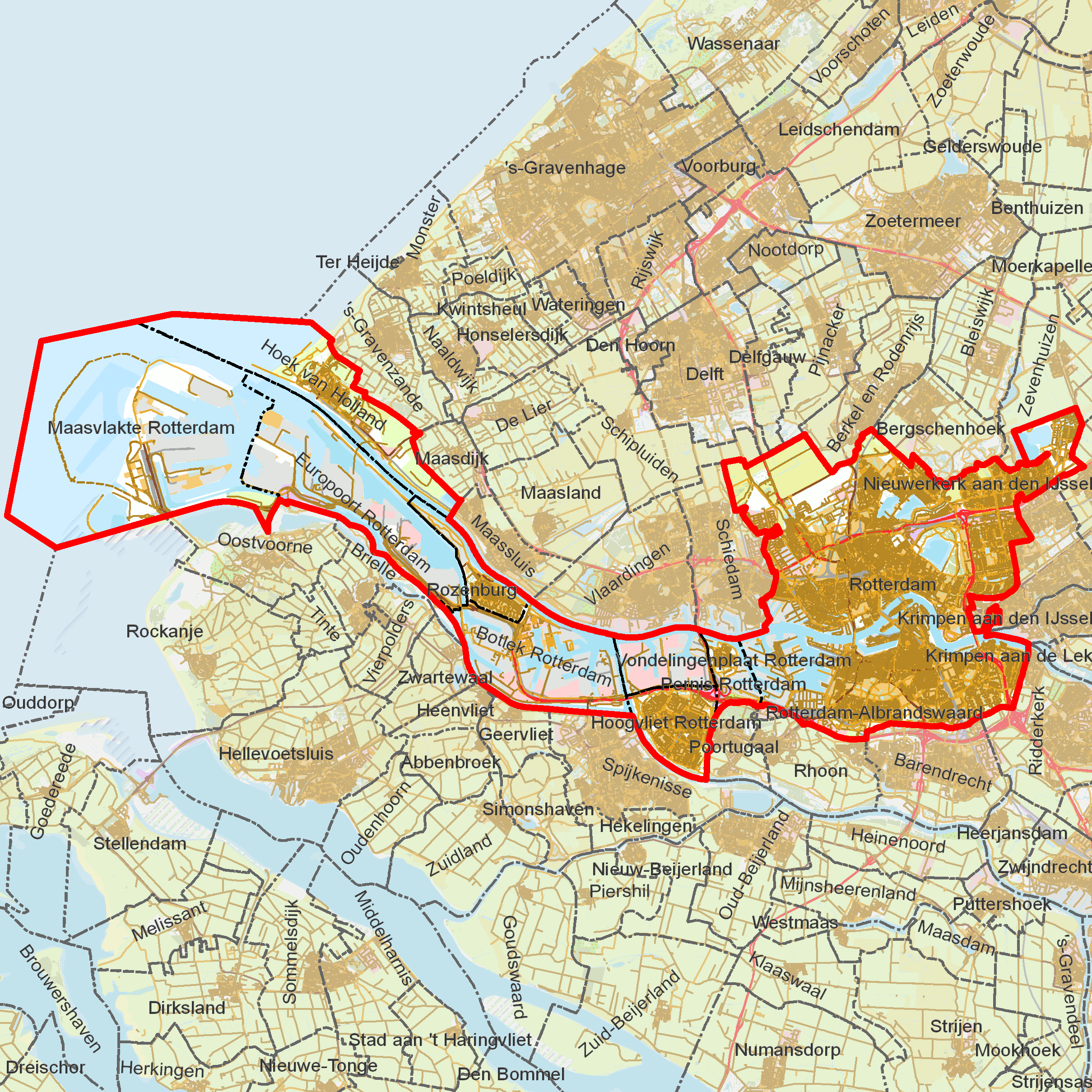 BAG woonplaatsen - Gemeente Rotterdam.png